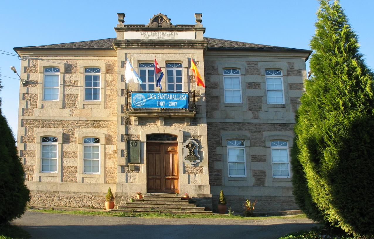 A Liga de Santaballa